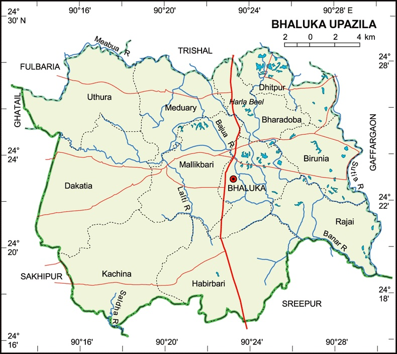 Bhaluka